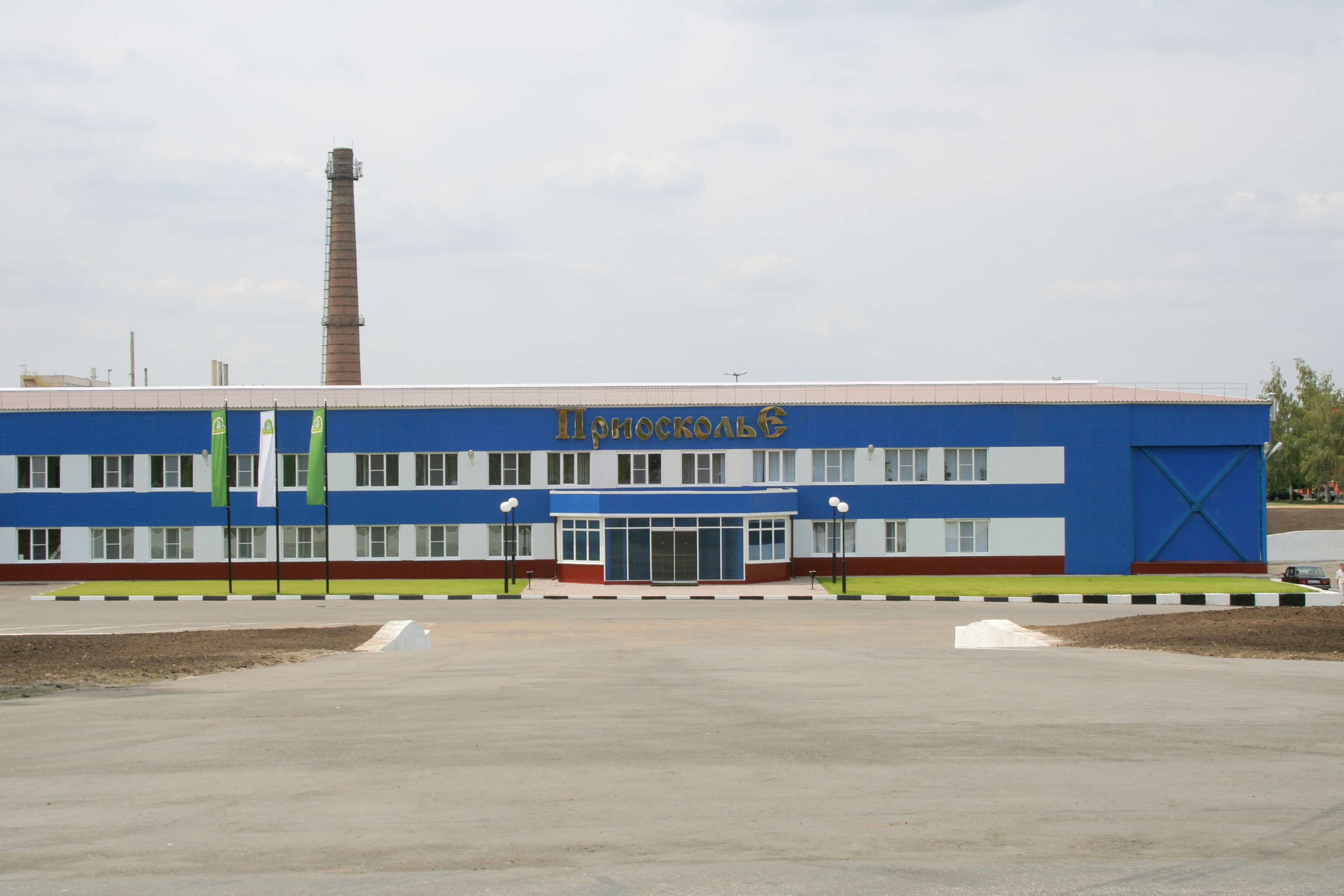 Приосколье. Завод по производству колбасных изделий. Город Новый Оскол.